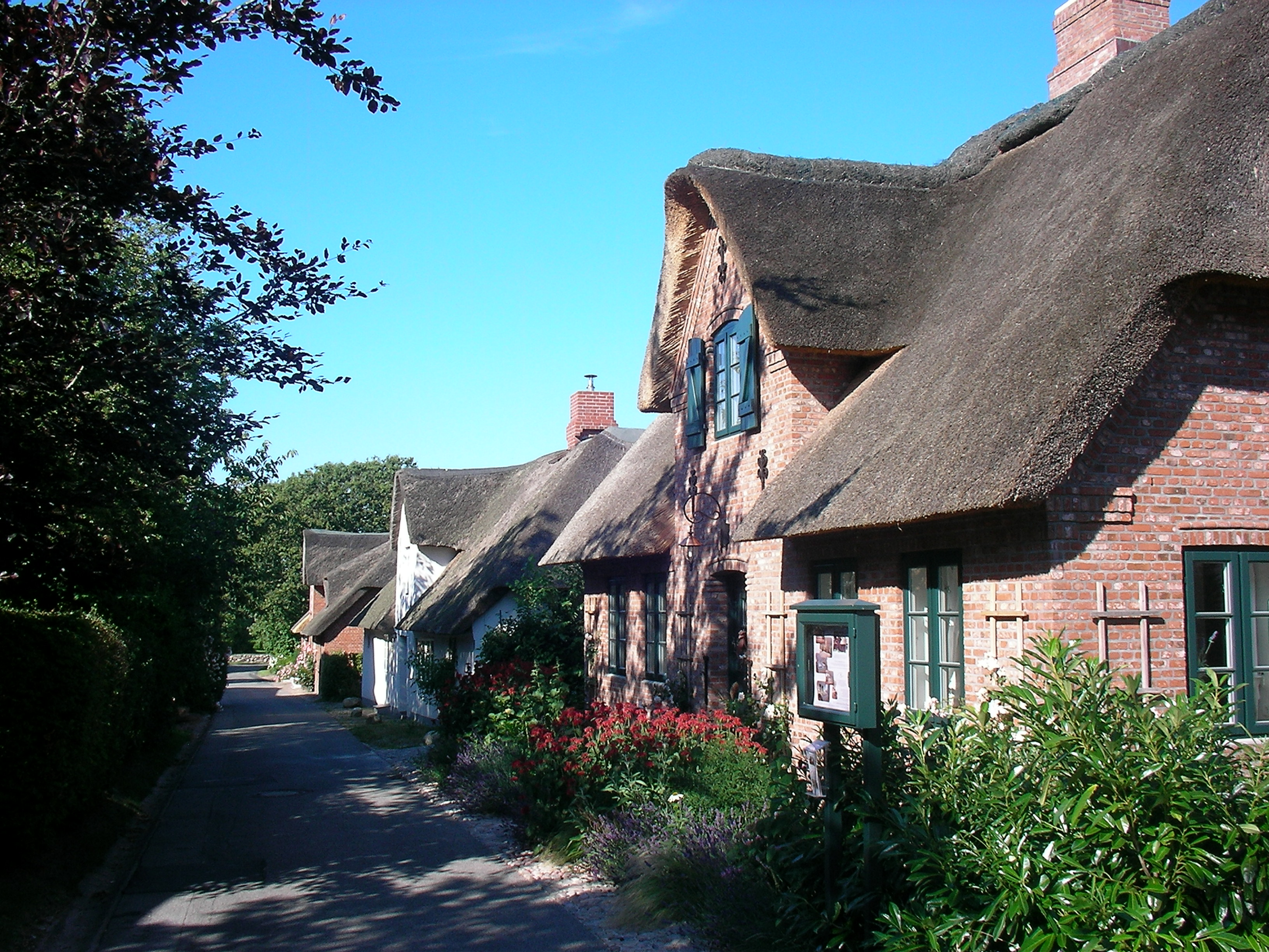 Oevenum